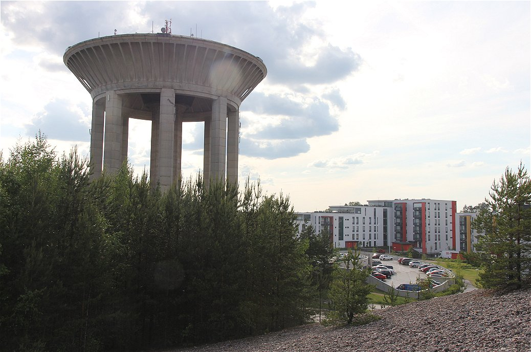 Vantaan Simonkylässä sijaitseva Hiekkaharjun vesitorni ja sen vieressä sijaitsevia asuintaloja pysäköintialueineen. Likipitäen kuvan pysäköintialueen paikalla toimi vuosina 1961-2011 Hiekkaharjun paloasema.